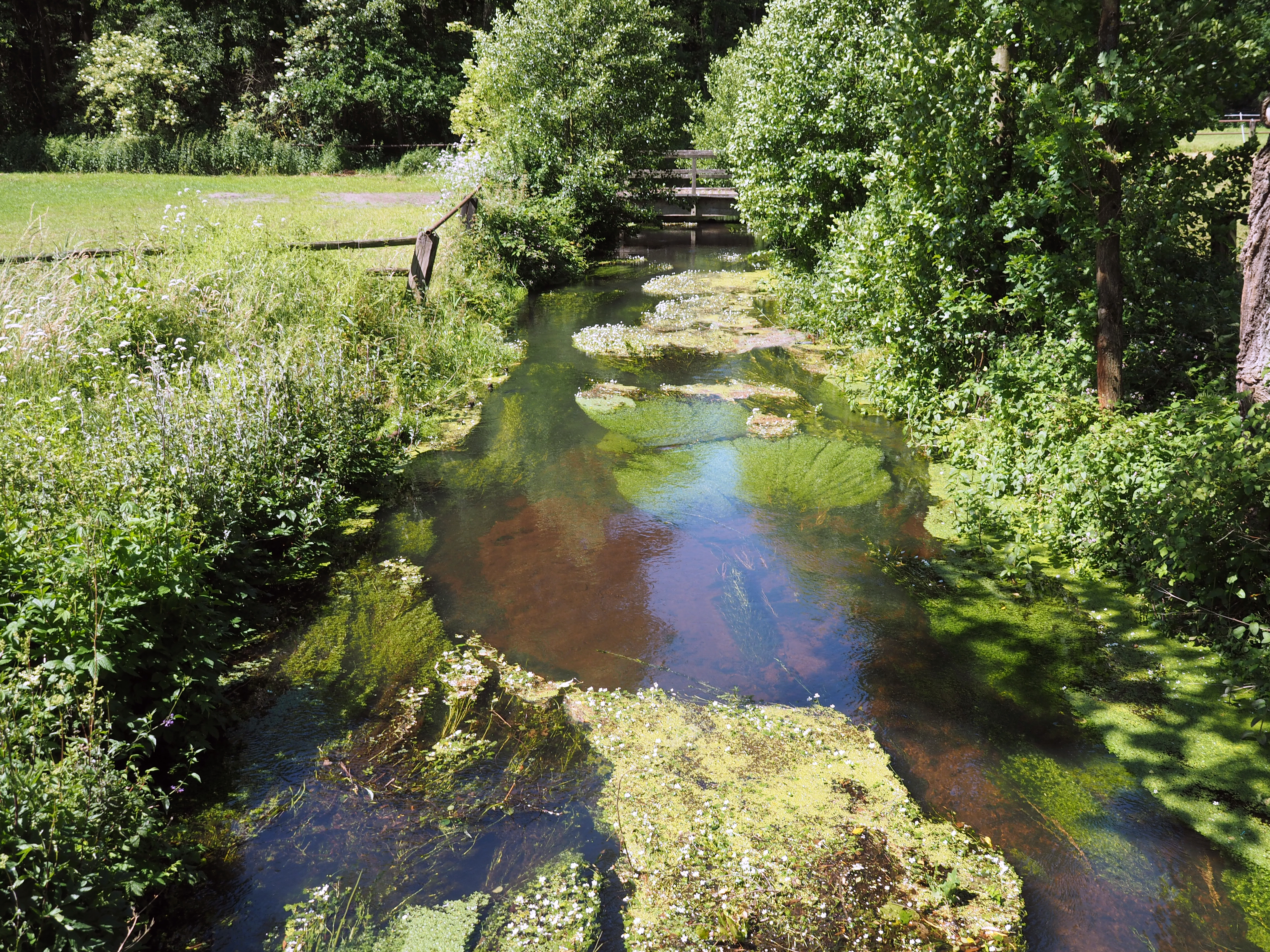 Kleine Örtze bei Trauen (Kreutzen), Niedersachsen, Germany